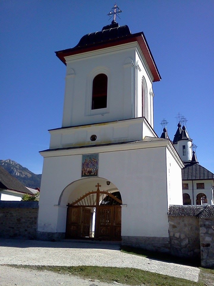 Turn clopotniță 06